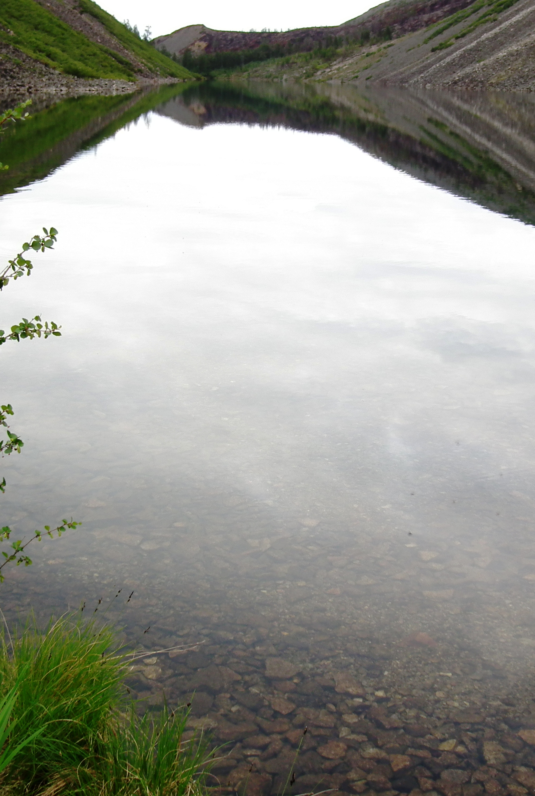 Глубоководное озеро Галитур, расположено недалеко от посёлка Талая, Магаданская область.